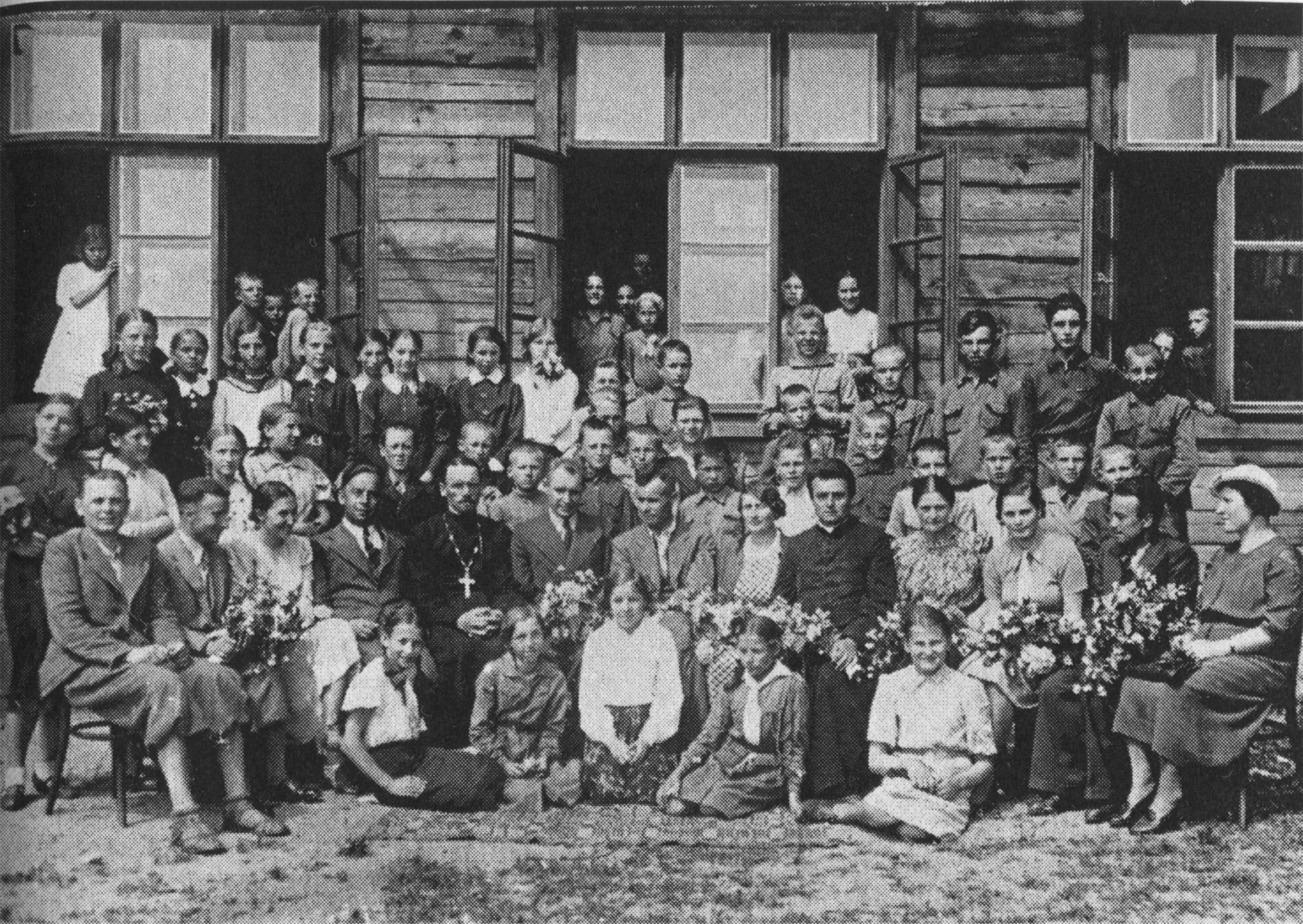 Uroczyste zakończenie roku szkolnego 1938/1939 w Publicznej Szkole Powszechnej w Wiszniewie, w powiecie wołożyńskim województwa nowogródzkiego. Od lewej siedzą: Adam Chomicz, Jan Jundził, Maria Płażewska, Kazimierz Duś, pop (NN), Stanisław Łukaszewicz - kierownik szkoły, inspektor szkolny z powiatu wołożyńskiego (NN), Maria Duś, ks. Jan Licynowicz, Hołub (?) kierowniczka biblioteki szkolnej, Lidia Skurat, Czesław Pachelski, Józefa Pietraszkiewicz. Od lewej w ostatnim rzędzie stoją: Kławdia Szakonówna, NN - córka zakrystiana posługującego w czasie nabożeństwa w cerkwi, Helena Dubicka, Julia Bittel (po wyjściu za mąż Broszczyk), Rywa Kielamanówna (pochodzenia żydowskiego; nieco z tyłu), Ewa Miejszutowicz (pochodzenia żydowskiego), Nachama Podberska (pochodzenia żydowskiego). Rząd II niżej: Anna-Irena Buraczewska, Helena Giembicka (pochodzenia tatarskiego), Złata Kapłanówna (pochodzenia żydowskiego), Tacjana Sienkiewiczówna, Edward Matus. Siedzą od lewej: Regina Jankowska, Helena Malinowska, Helena Skadorwa, Stanisława Hryniukówna. W oknie drugim stoją od prawej: Wala Oszykowska (w białej bluzce), Stanisława - jej koleżanka (była woźną w szkole), Witold Bernat (stoi niżej), Zusman (pochodzenia żydowskiego, drugi od prawej strony). Z archiwum rodzinnego Julii Broszczyk z Piły.